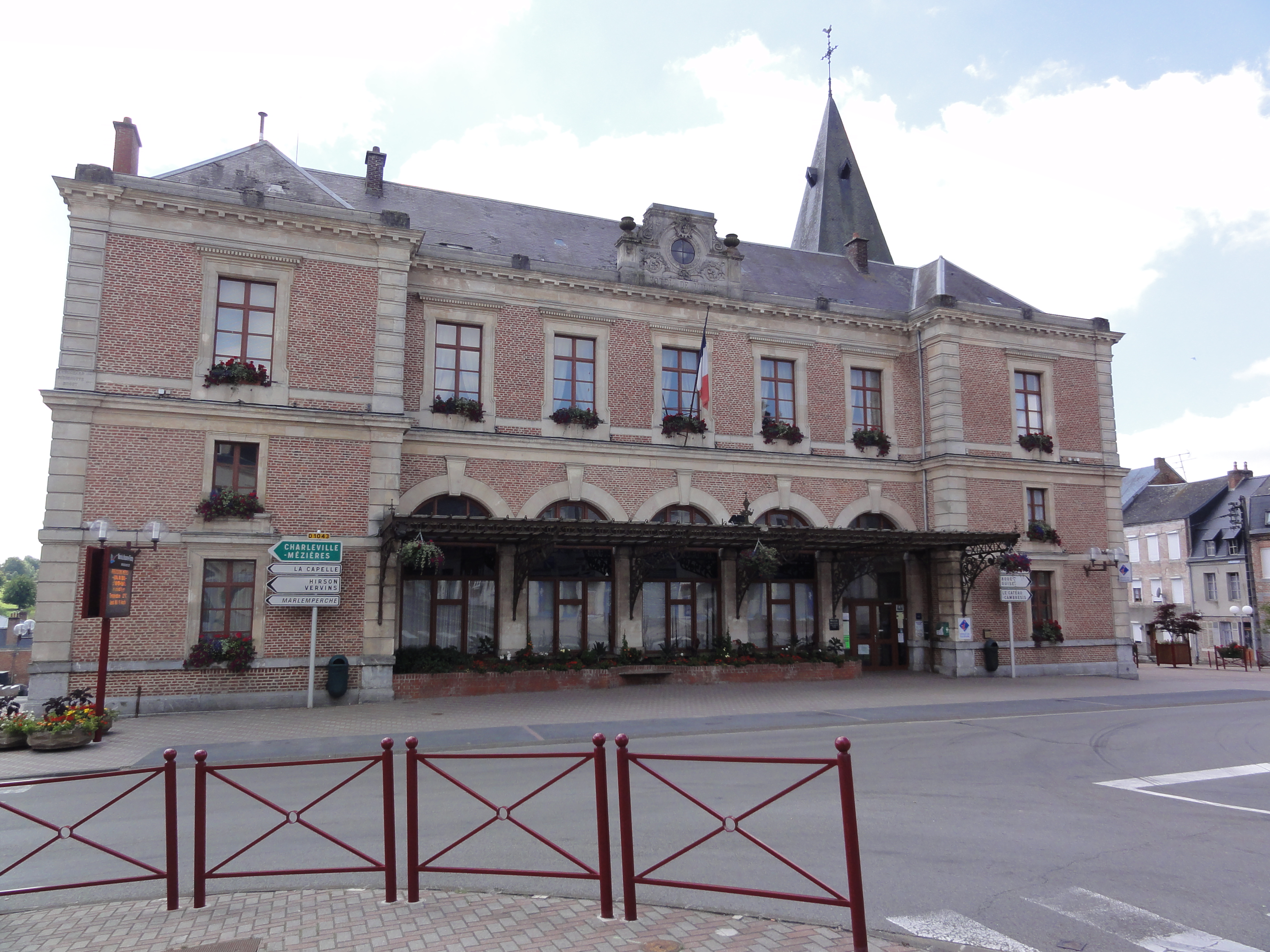 Le Nouvion-en-Thiérache (Aisne, Fr) mairie